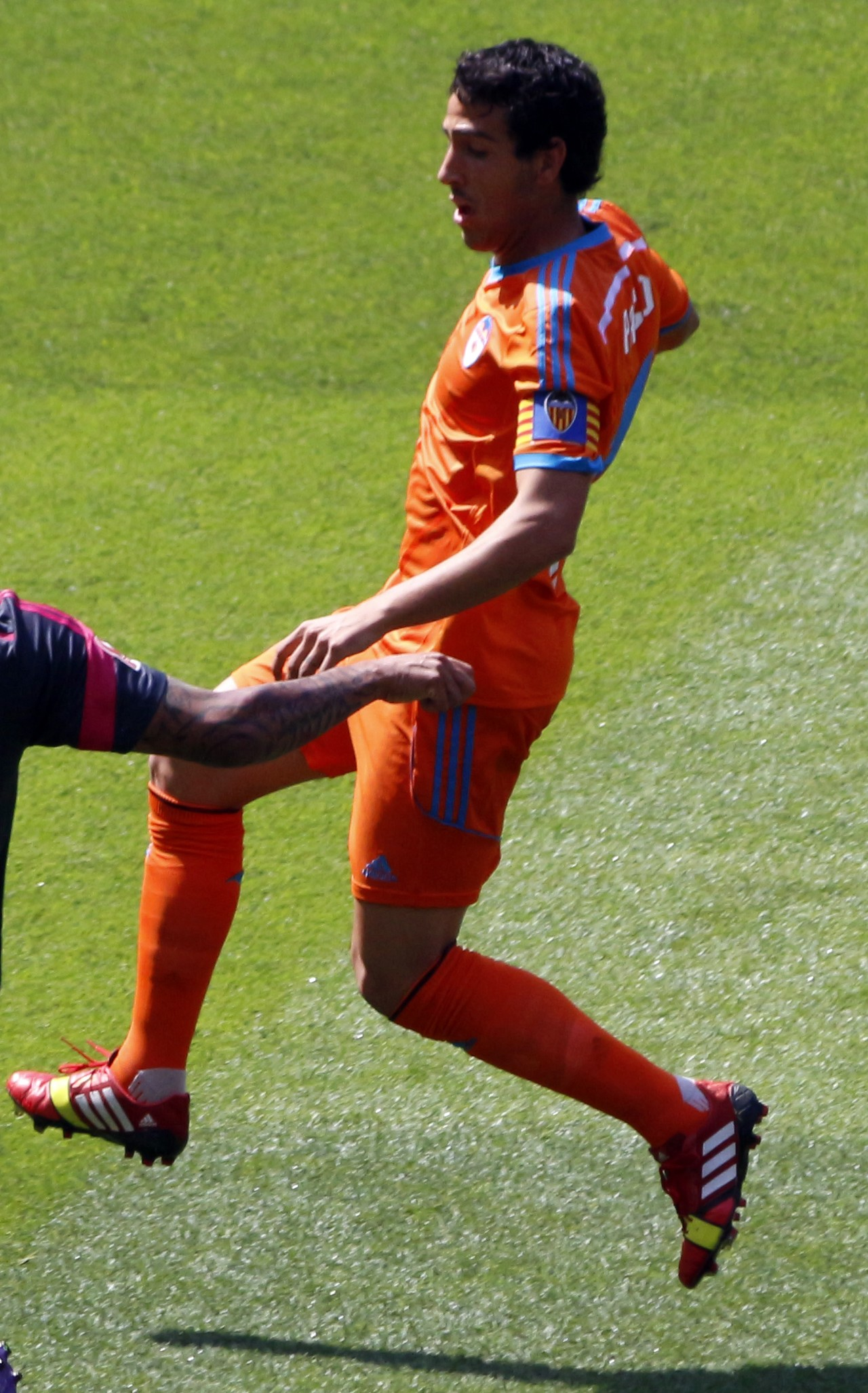 Emirates Cup, 3 d'agost de 2014.